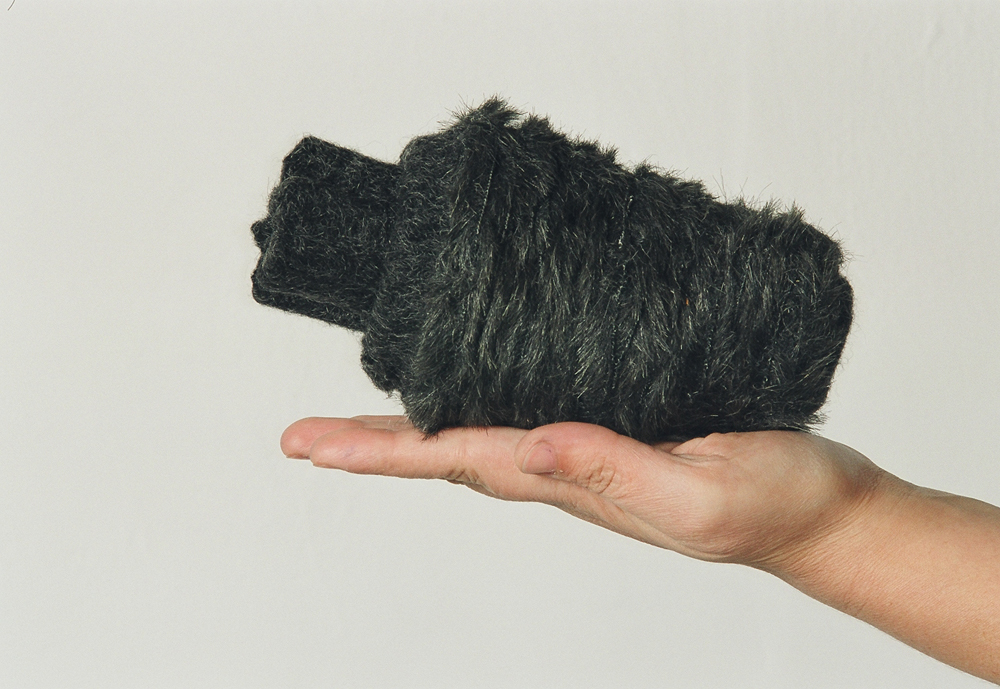 פצצה עבודה